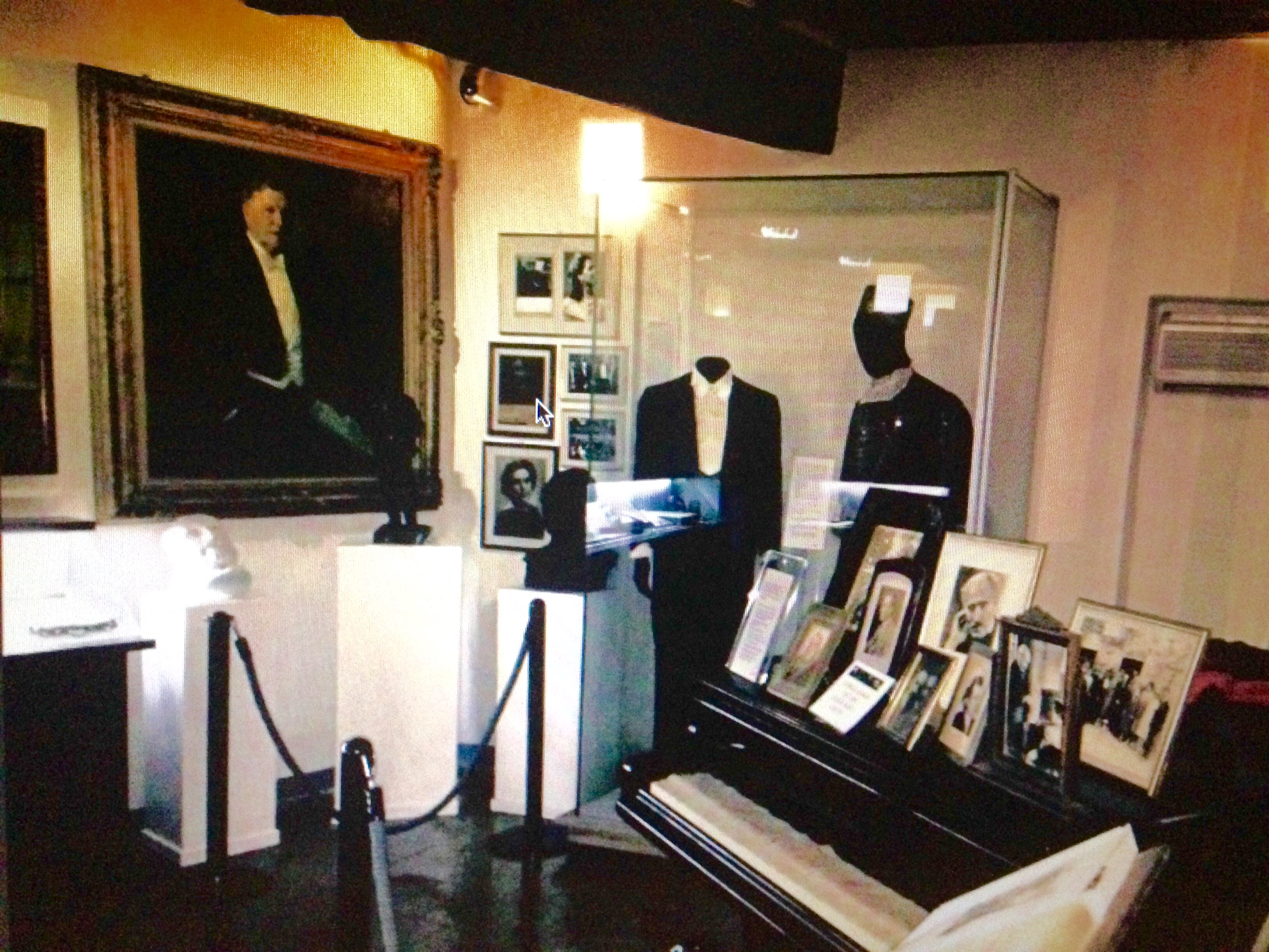 Stanza del pianoforte e compagni di viaggio.